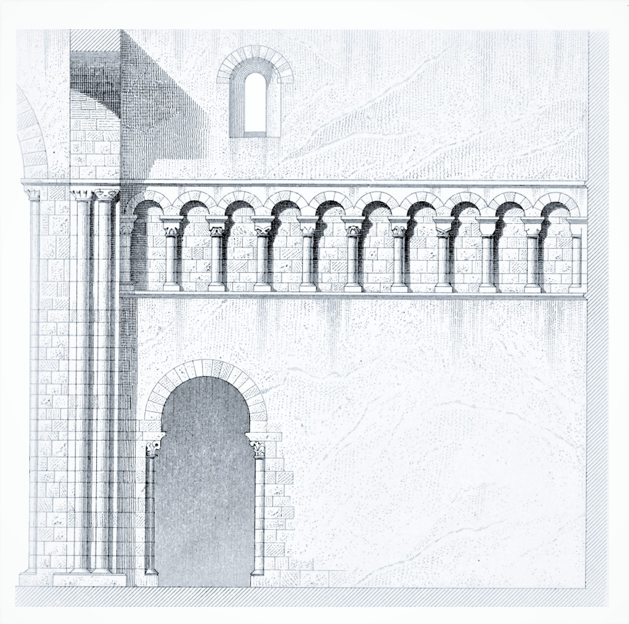 Abbayede Lonlay '61), détail du transept (image du domaine public (Ruprich-Robert) modifiée)